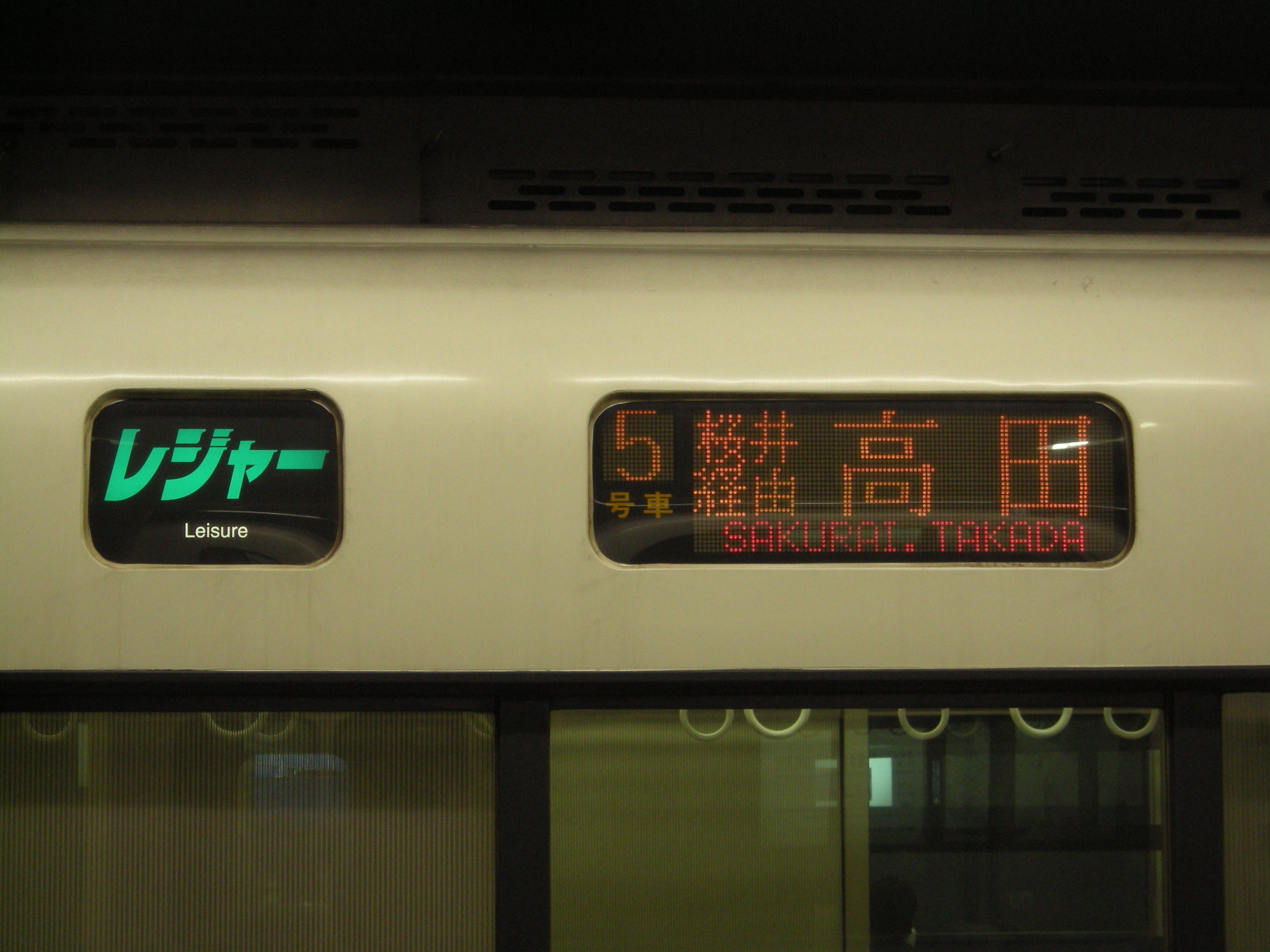 山辺の道レジャー号行先幕